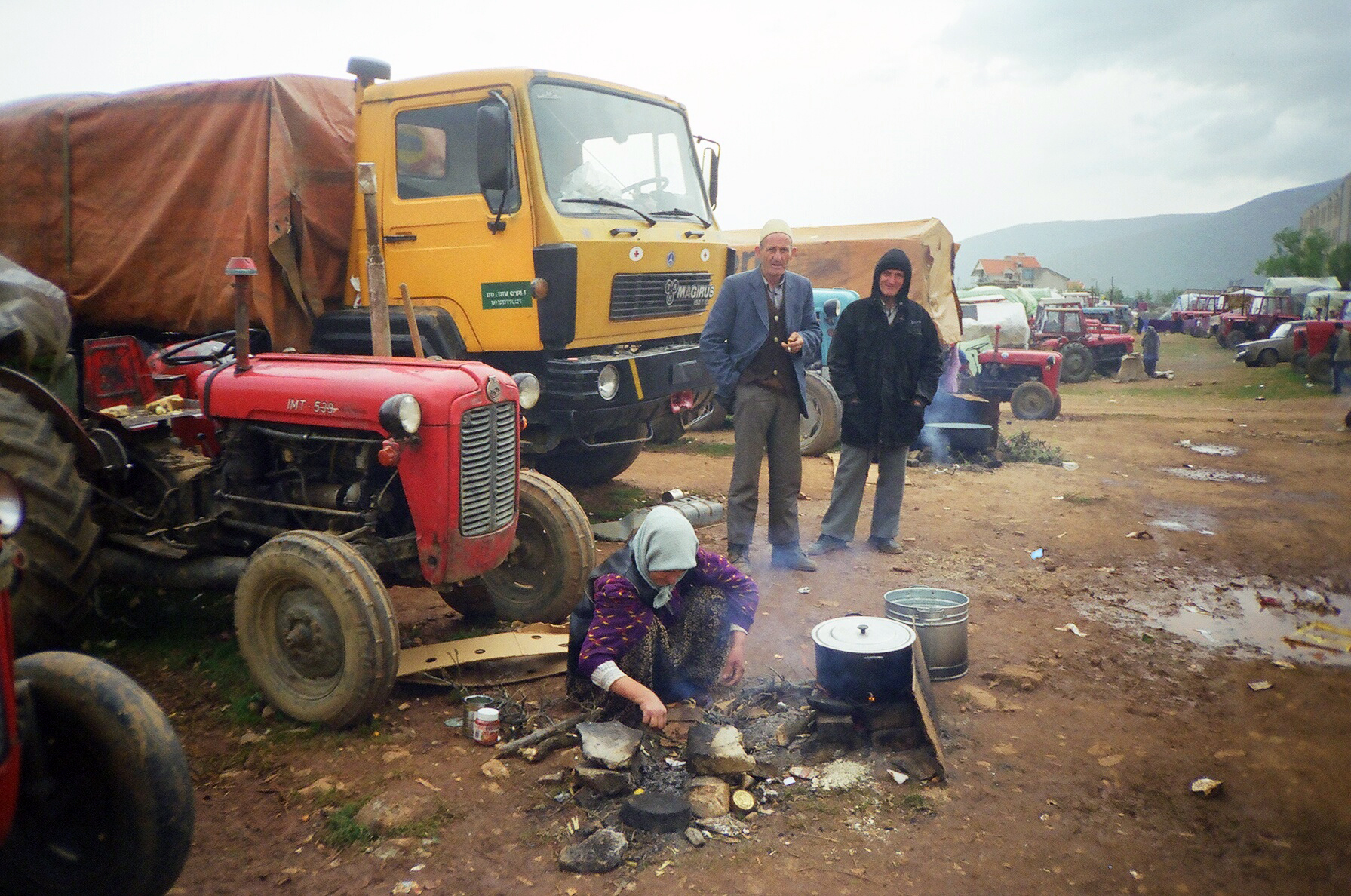 Eksodi i shqiptarve teKosoves gjate vitit 99